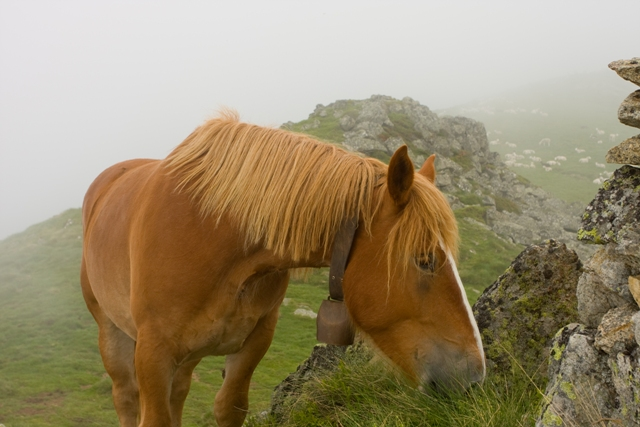 Un cheval sur une estive (Pic du Midi de Siguer, 2003 m, vallée de Siguer) en Ariège.